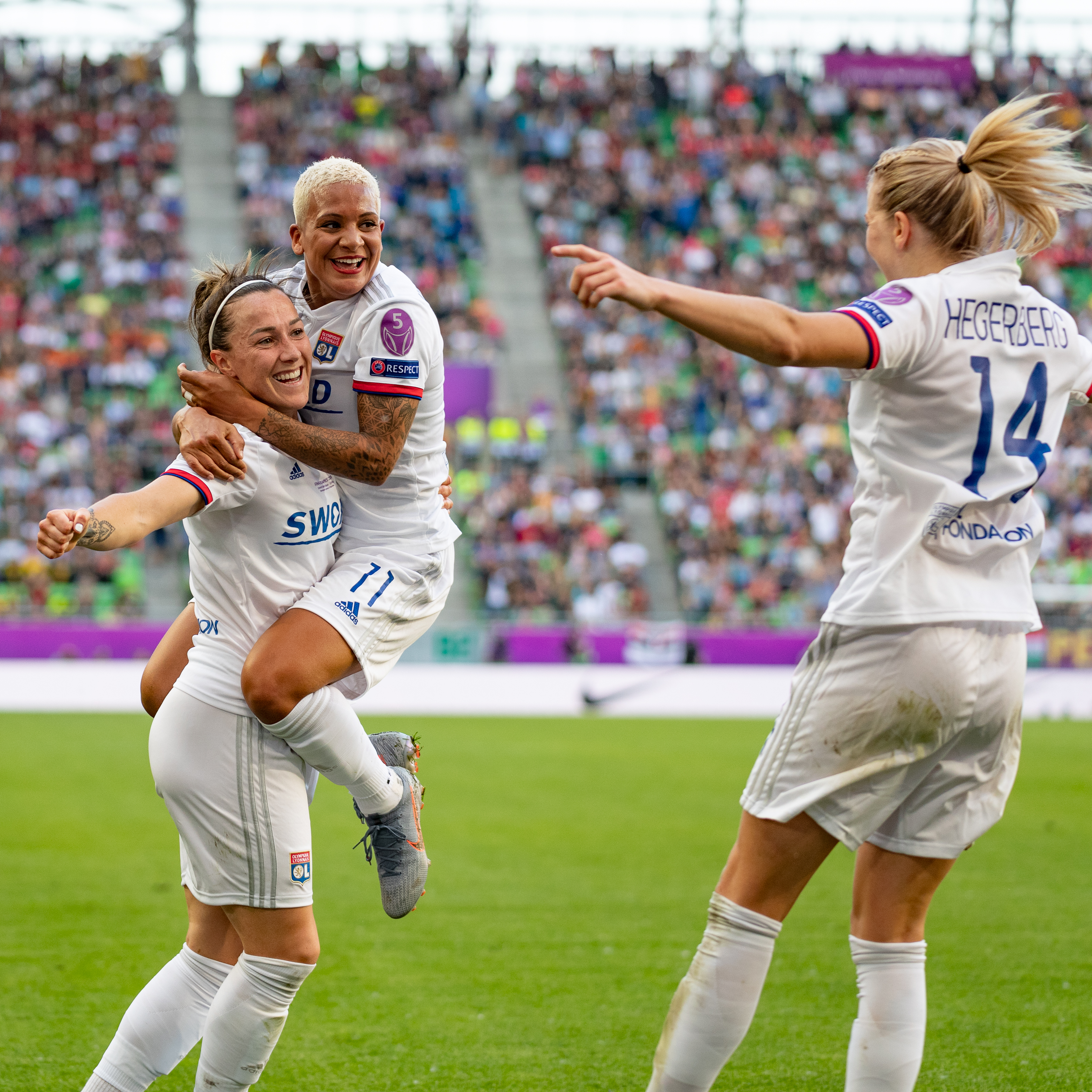 Fußball, Frauen, UEFA Women's Champions League, Olympique Lyonnais - FC Barcelona; Jubel, celebration bei oOlympique Lyonnais über das 0:4 durch Ada Hegerberg (Olympique Lyon,14); v.li.: Lucy Bronze (Olympique Lyon, 2), Shanice van de Sanden (Olympique Lyon, 11), Ada Hegerberg (Olympique Lyon,14)